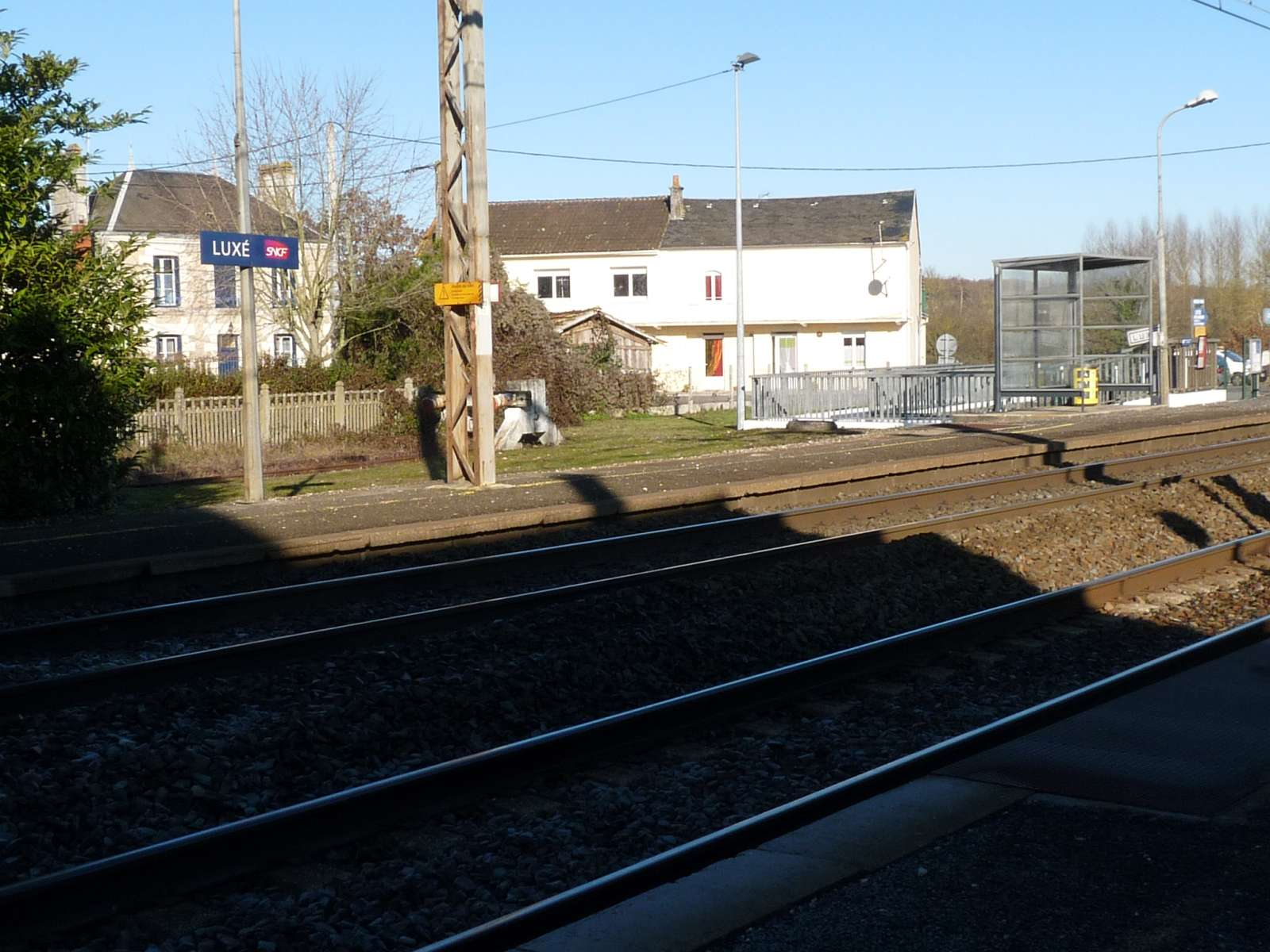 les voies, gare de Luxé, Charente, France; vue vers l'ouest